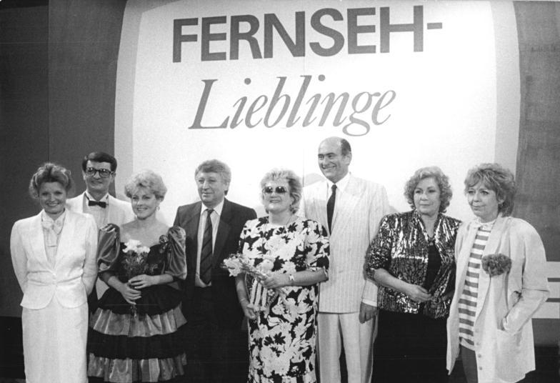 ADN-ZB Kasper 27.3.88 Gera: Fernsehlieblinge 1987. Im Haus der Kultur wurden in einer vom Fernsehen original übertragenen Gala die Fernsehlieblinge 1987 gekürt. In der Gunst des Publikums am höchsten standen: Helga Piur, Klaus Feldmann, Petra Kusch-Lück, Hans-Joachim Wolfram, Helga Hahnemann, Heinz Florian Oertel, Erika Krause und Ellen Tiedtke (v.l.n.r.)